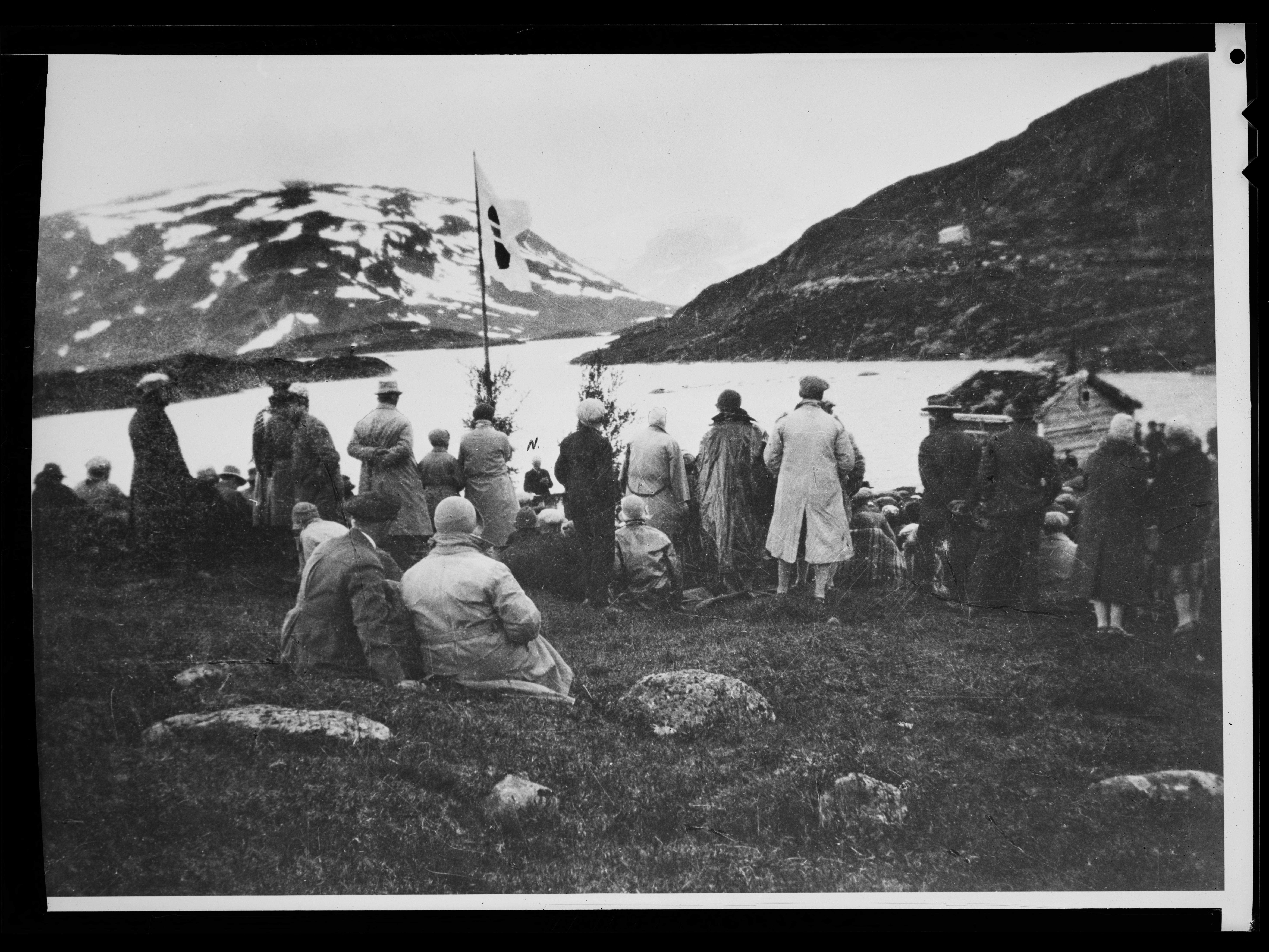 Bildet er hentet fra Nasjonalbibliotekets bildesamling Haukeliseter, Vinje, Telemark